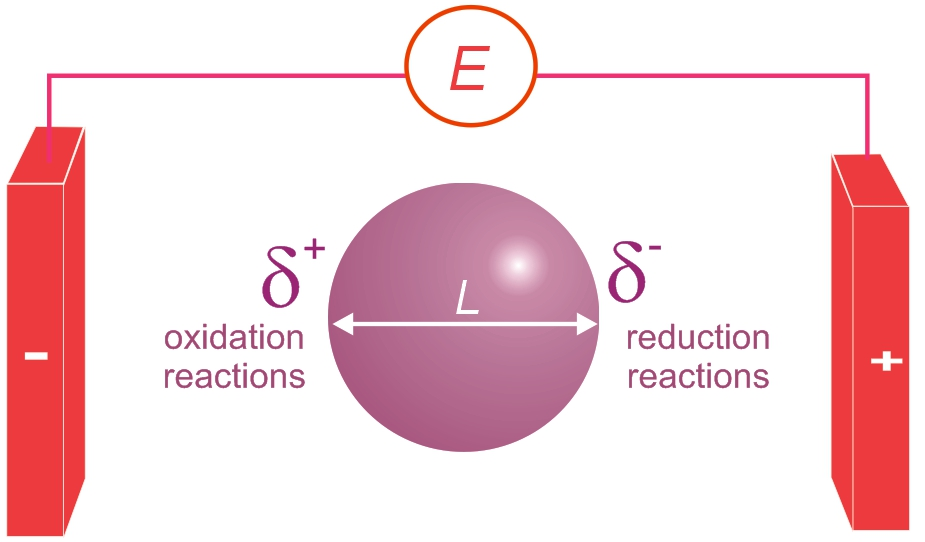 Bipolar electrochemistry